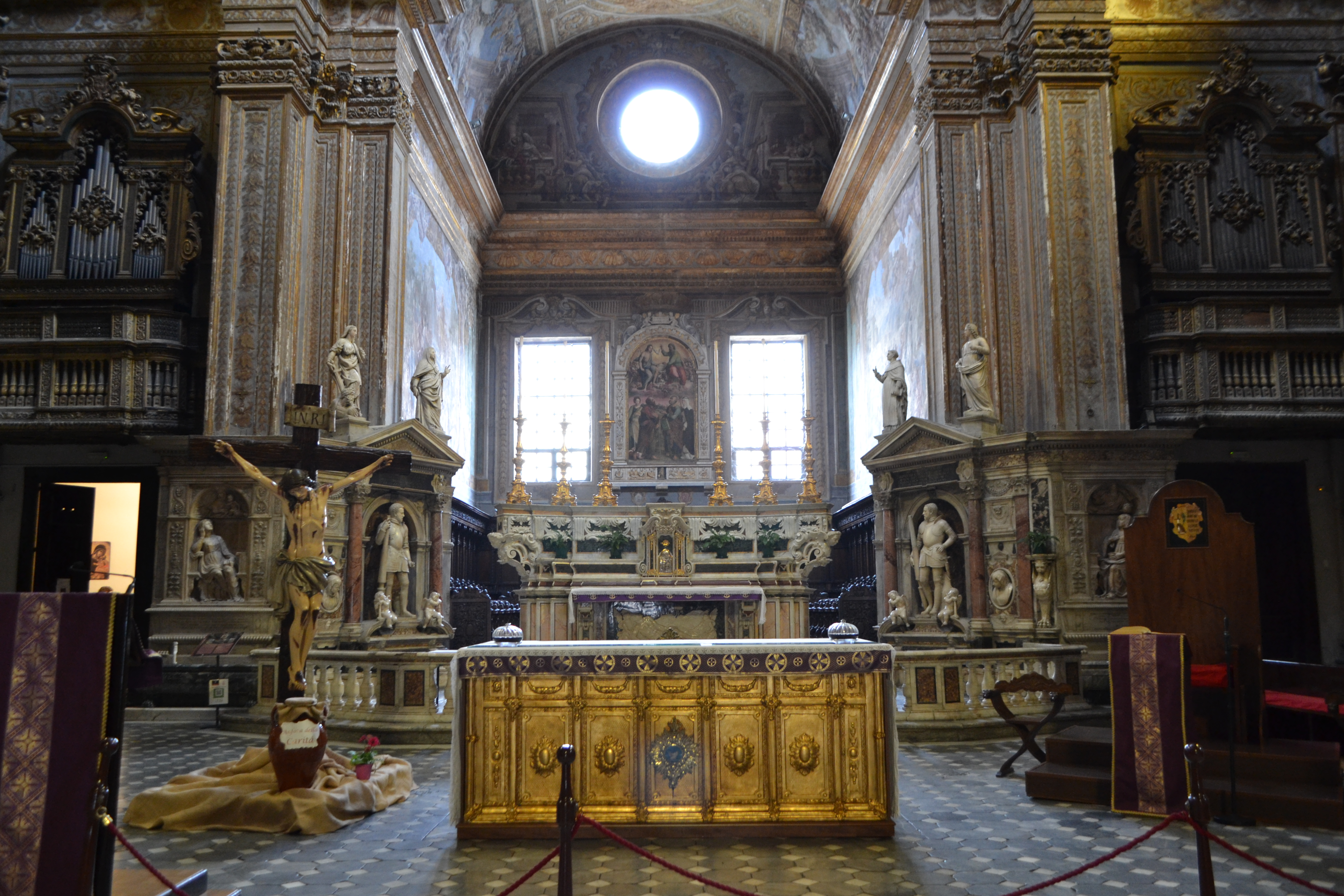 Chiesa di Santa Caterina a Formiello di Napoli - Presbiterio (o cappella Spinelli di Cariati)